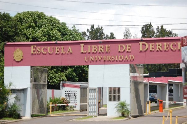 Panoramia Universidad Escuela Libre de Derecho.